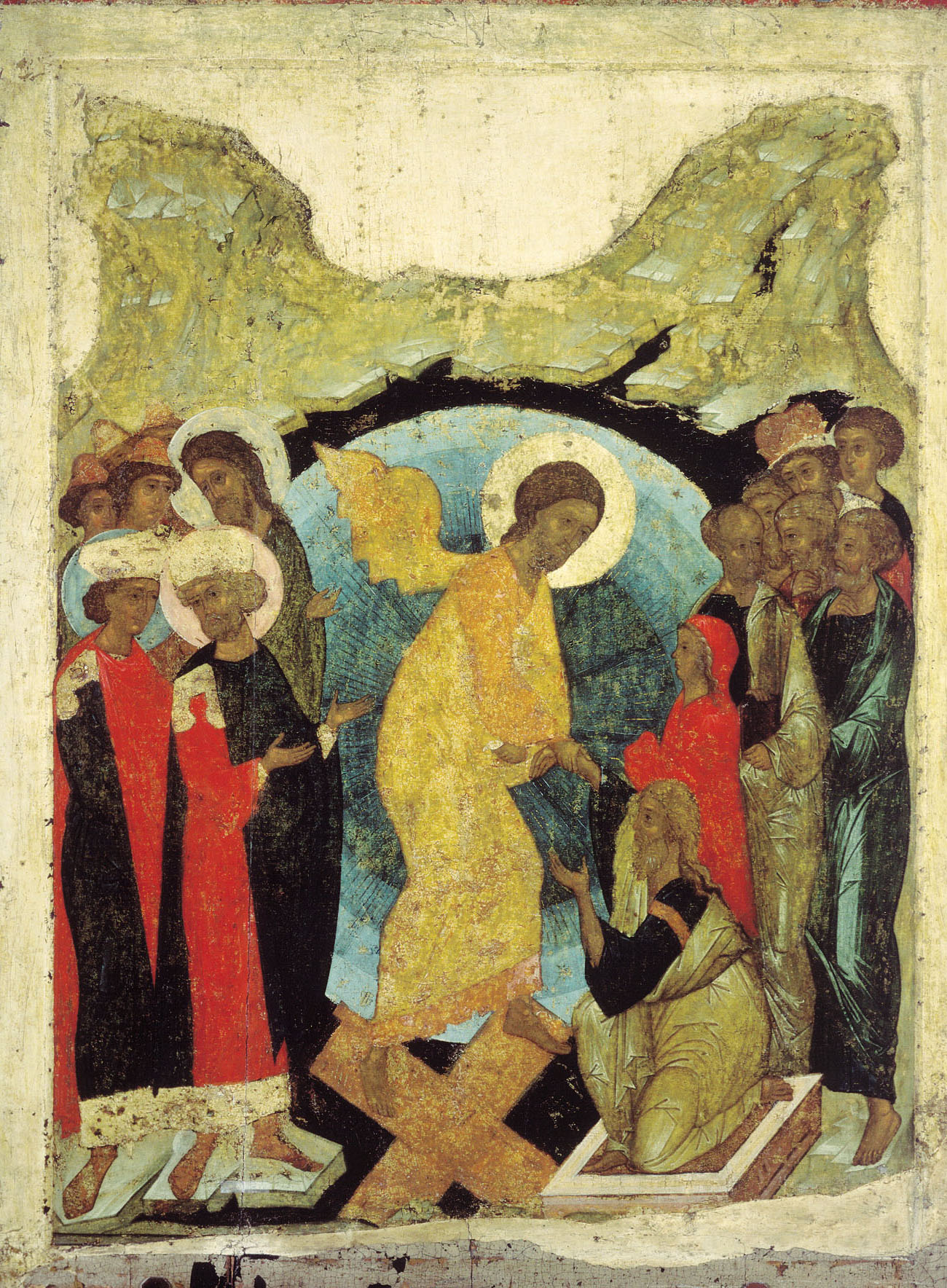 Сошествие во ад. 1408-1410. ГТГ НЕ Андрей Рублёв. Сошествие во ад Школа или худ. центр: Москва 1408 г. 124 × 94 см Государственная Третьяковская галерея, Москва, Россия Инв. 22953 Происходит из праздничного чина Успенского собора во Владимире